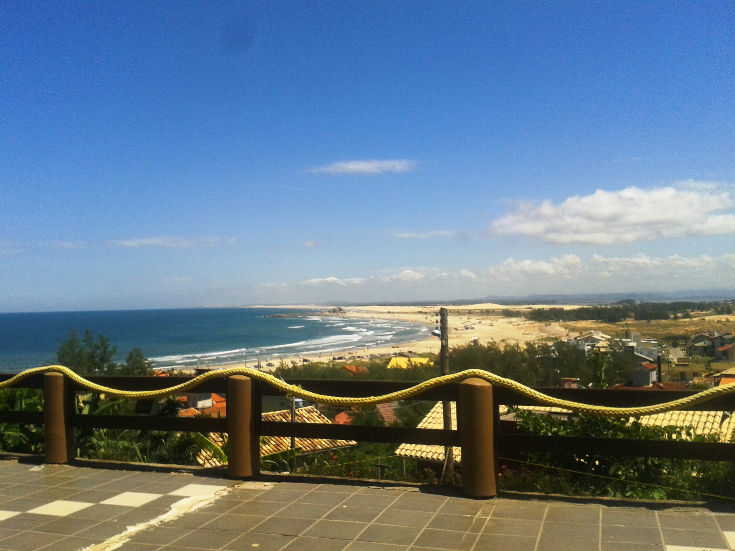 Laguna